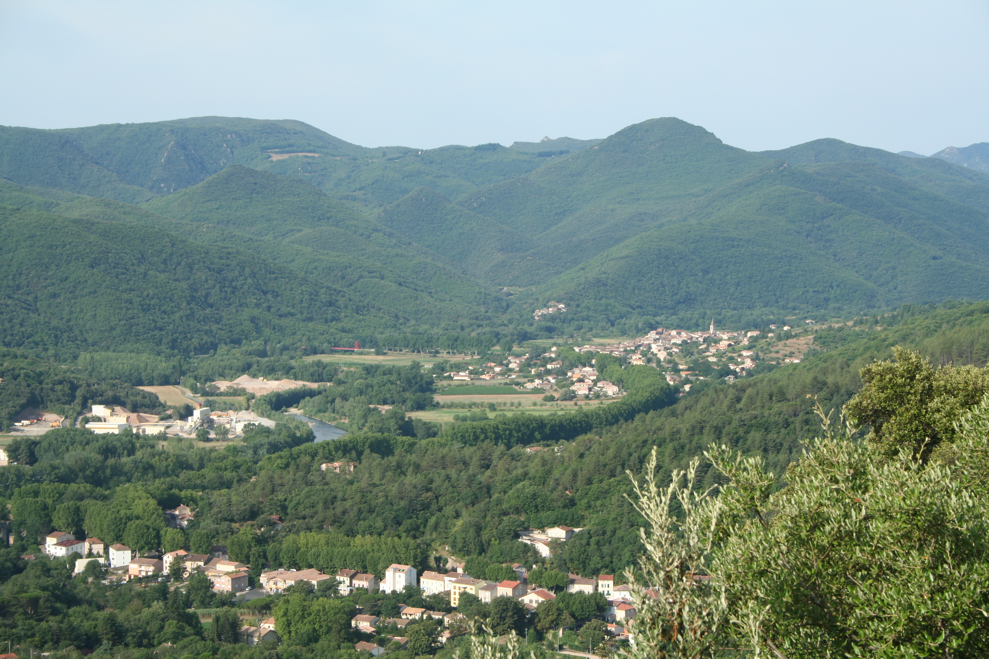 Le Poujol-sur-Orb (Hérault) - La vallée de l'Orb et Le Poujol-sur-Orb vus depuis Capimont.